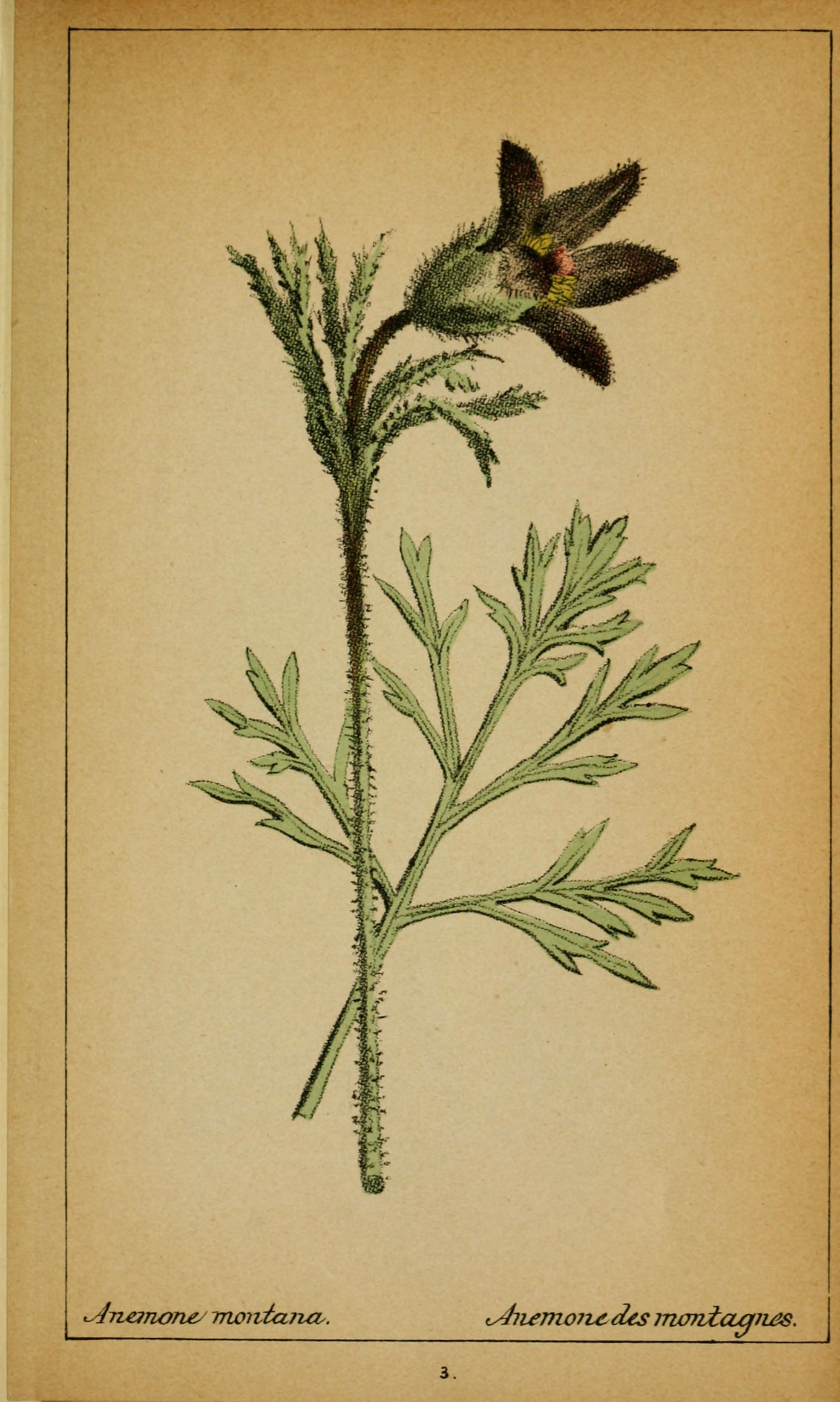 ^Tianon&y inoiviana.. tAiiemoitc des mxmiaqiiûs.